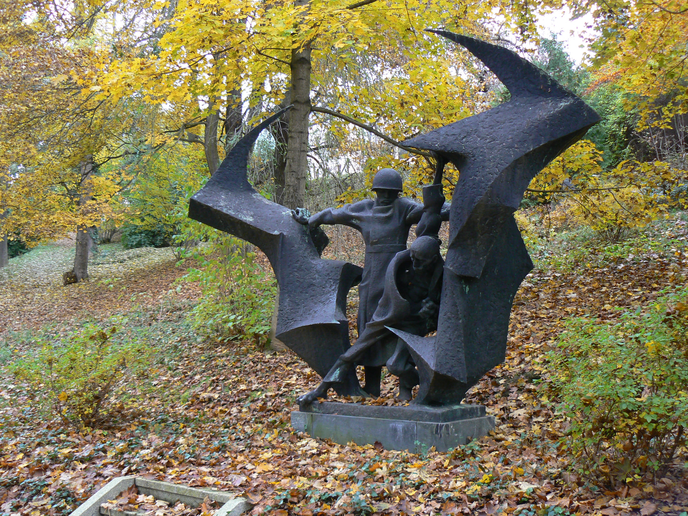 Plastik „Befreiung“ des Bildhauers Jürgen Raue